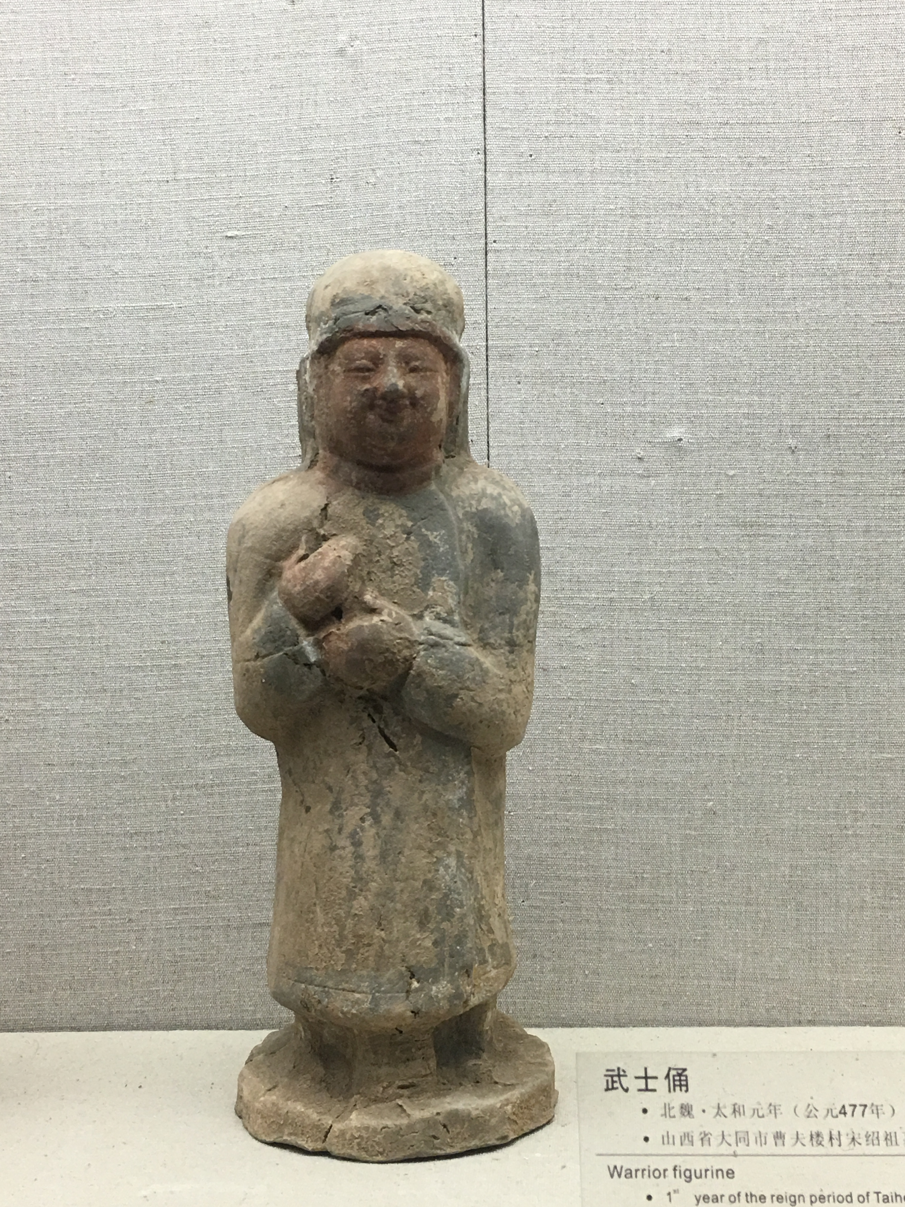 北魏武士俑，出土于山西省大同市宋绍祖墓，现藏于山西省博物院